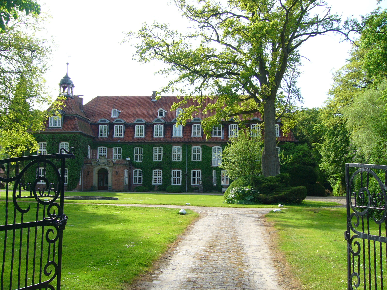 Herrenhaus des Gutes Testorf (ca 1770).